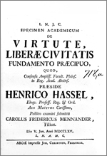 Carl Fredrik Fredenheim, ent. Mennander maisterinväitöskirja